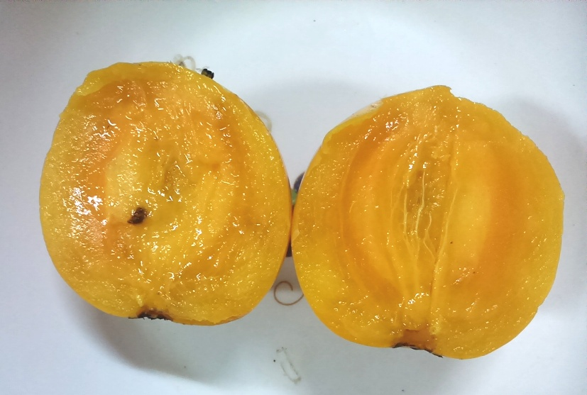 Belahan buah mundu, memperlihatkan isinya.